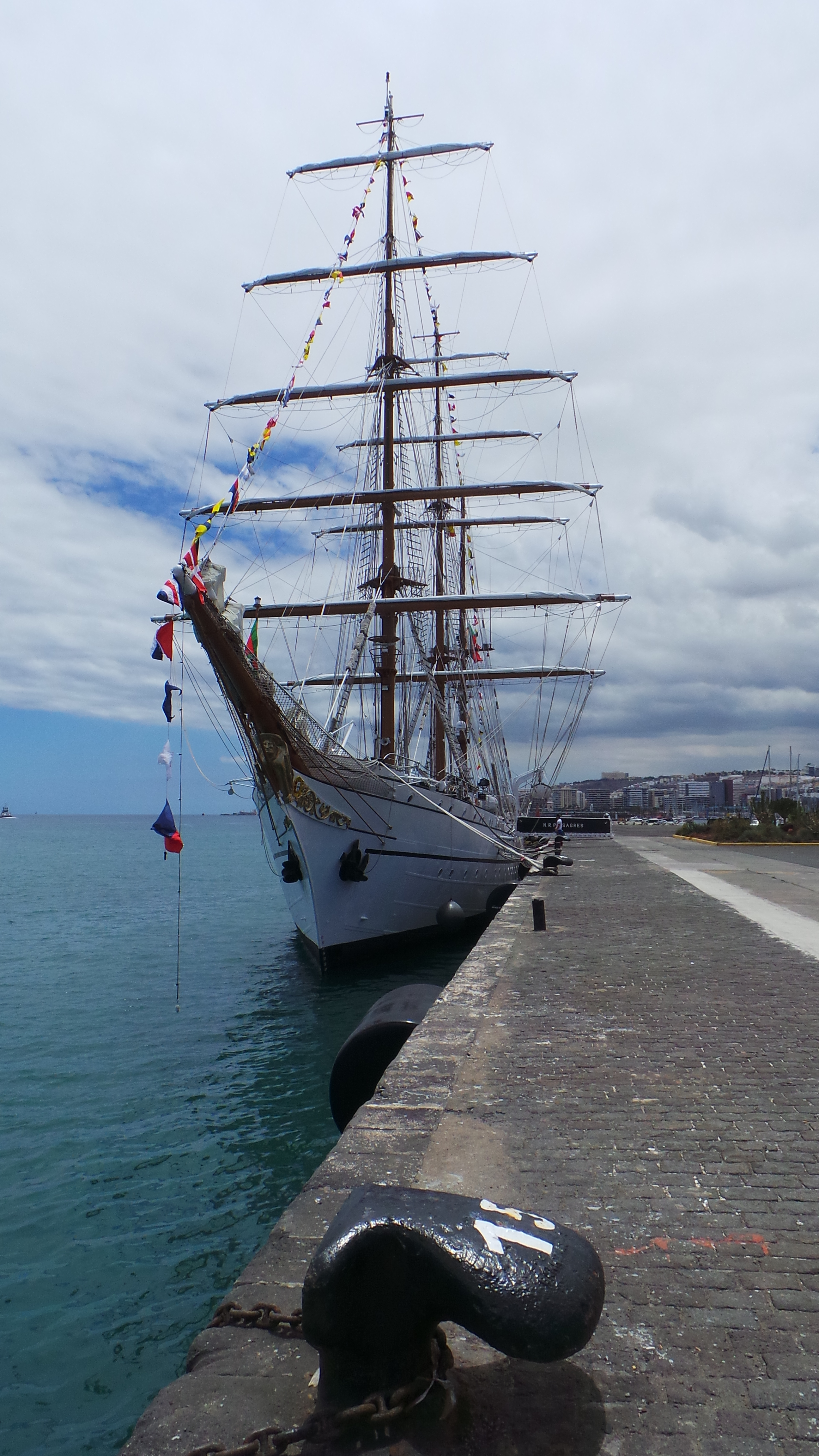 Visita al Buque Escuela NRP Sagres, en La Base Naval de Las Palmas de Gran Canaria. Este fin de semana de semana ( 20, 21 y 22 de junio de 2014) tenemos la oportunidad de disfrutar, en Las Palmas de Gran Canaria, de la visita del buque escuela portugués NRP Sagres, se encuentra atracado en el muelle de la base naval y podrá ser visitado hoy viernes hasta las 19h y mañana sábado de 10 a 12h y de 14 a 19h . El Buque proveniente de Lisboa partirá el domingo hasta Las Azores , para luego regresar a Lisboa, cuenta con unos 60 guardiamarines, con una decena de mujeres entre ellos, que realizan su periodo de instruccion Construido en 1937 en Hamburgo y tras varios avatares, fue adquirido en 1961 por la marina Portuguesa para sustituir al Sagres II, entrando en servicio como Sagres III en febrero de 1962. Tiene 89,5 metros de eslora, 12 de manga y 5,5 de calado, siendo su altura máxima de 45,5 metros. Cuenta además con 1.971 metros cuadrados de vela y desplaza 1.893 toneladas. La figura del mascarón de proa del Sagres III es el Infante D. Henrique nacido el 4 de marzo de 1394, siendo uno de los impulsores de la expansión y descubrimientos portugueses de la época. Más información del Buque : Web del Buque